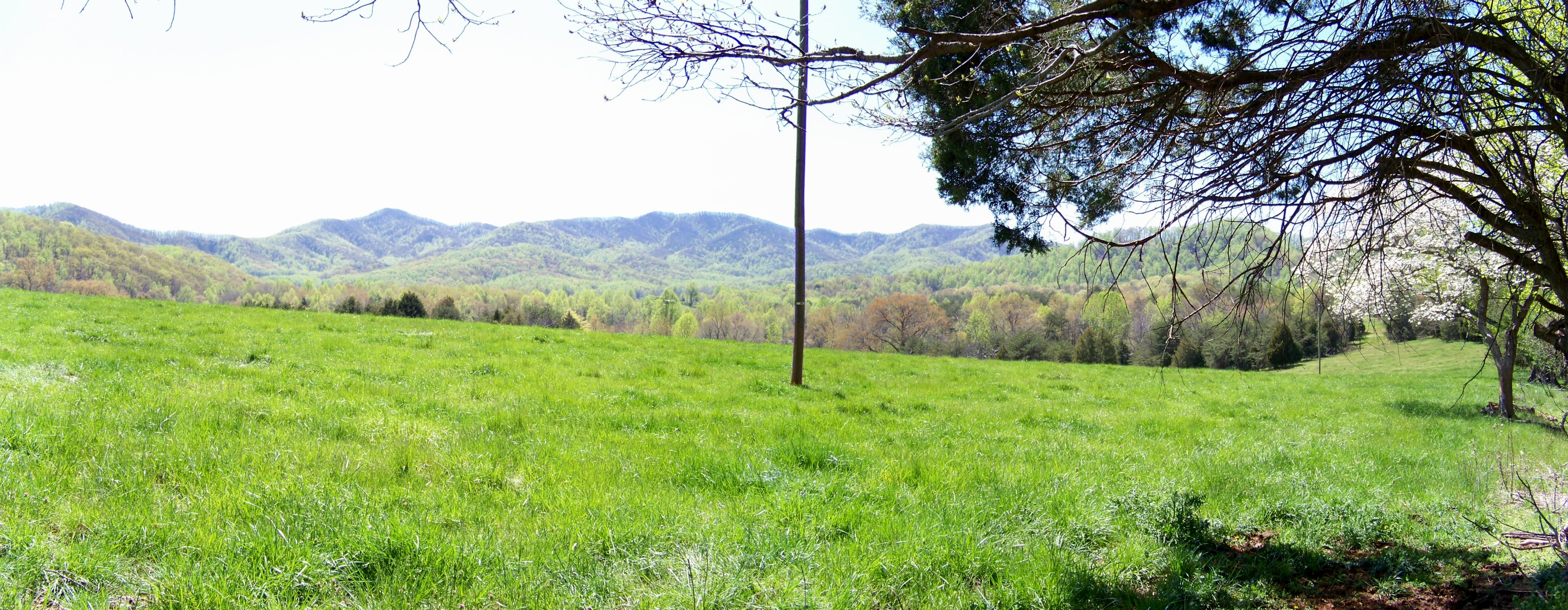 Schuyler, VA, USA